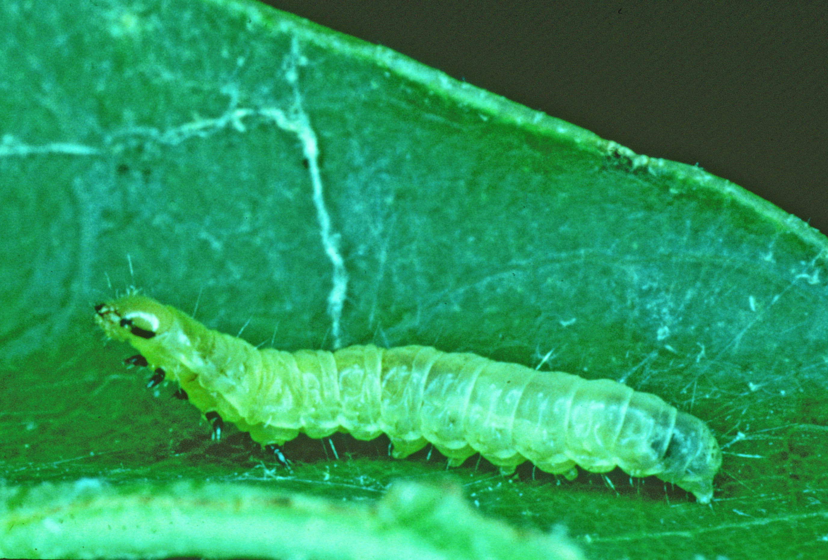 Oak leaf tier moth pupa, Croesia semipurpurana